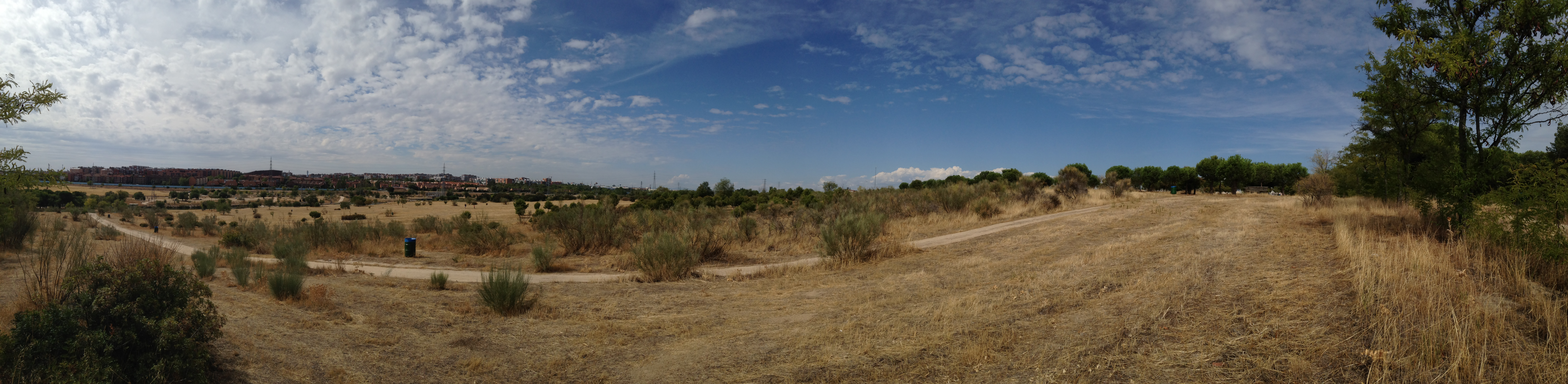 Panoramica de las Presillas Septiembre 2014, Alcorcón